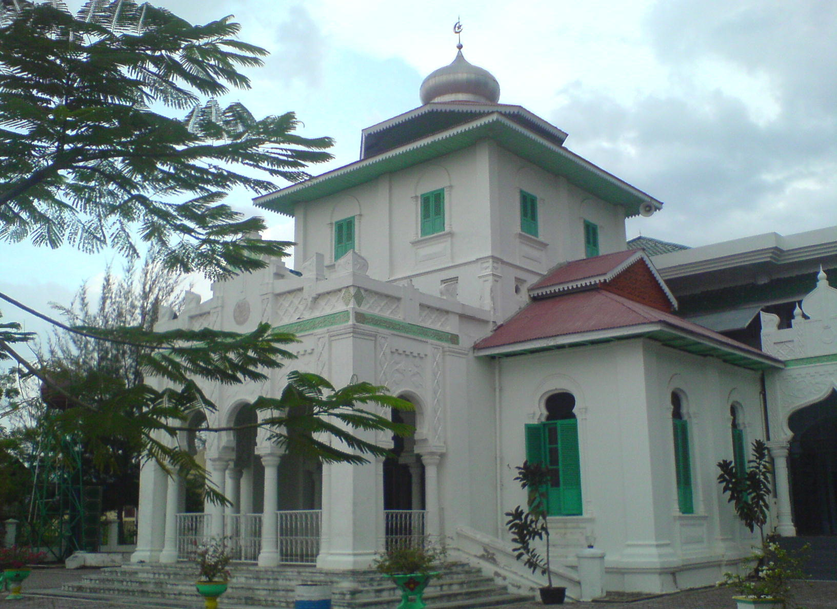 Mesjid Baiturrahim Ulèë Lheuë